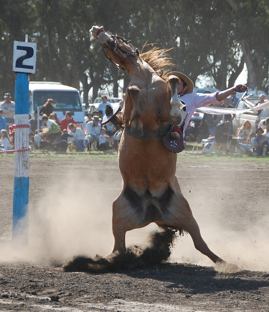 jinete jineteada doma